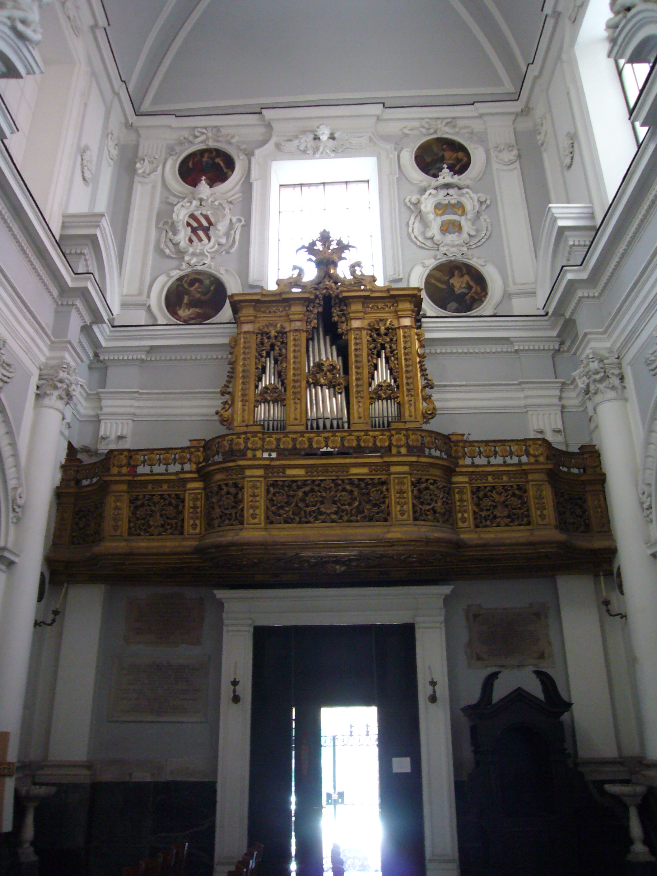 Napoli, Sant'Angelo a Nilo: organo